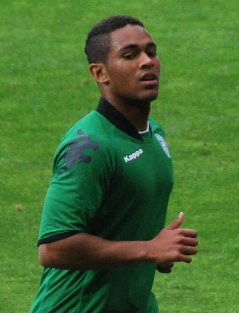 Fodboldspilleren Kevin Mensah fra Viborg FF. Her i 1. divisionskampen mod FC Roskilde på Viborg Stadion.